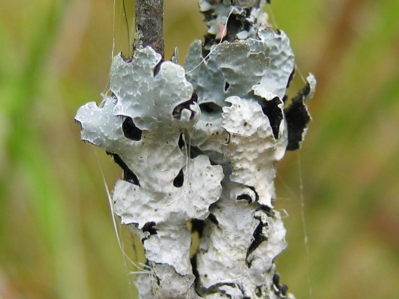 Parmelia sulcata auf einer Moor-Birke, Horster Moor